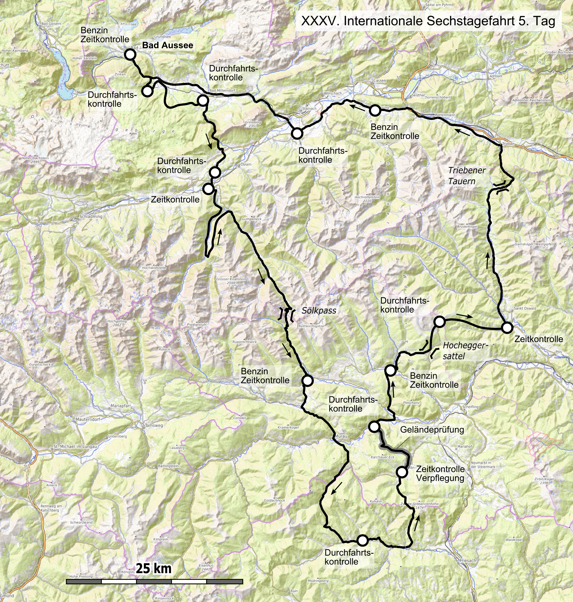 Karte der 35. Internationale Sechstagefahrt, Route des 5. Tages